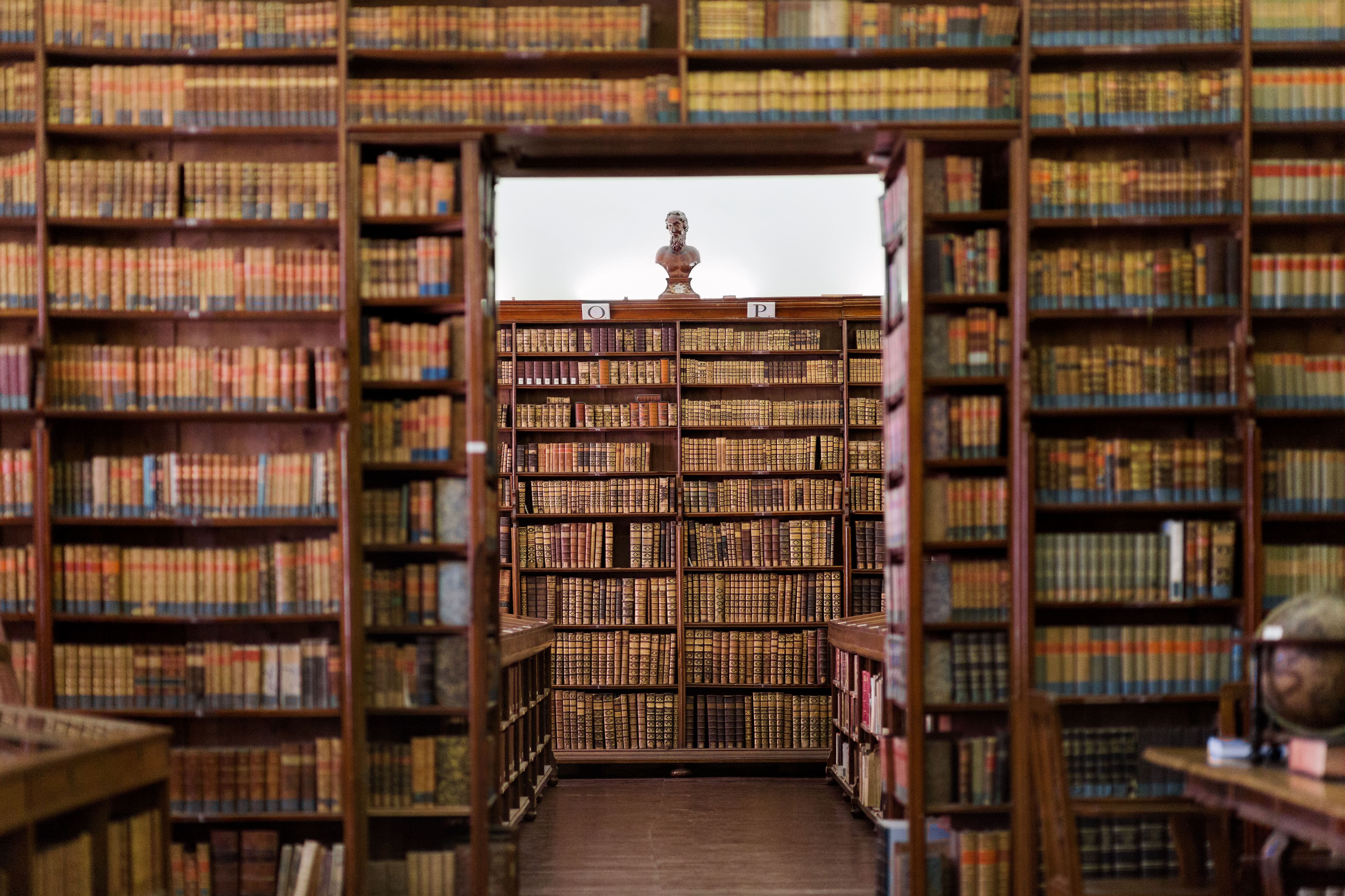 Klimo Könyvtár termei (Pécs)